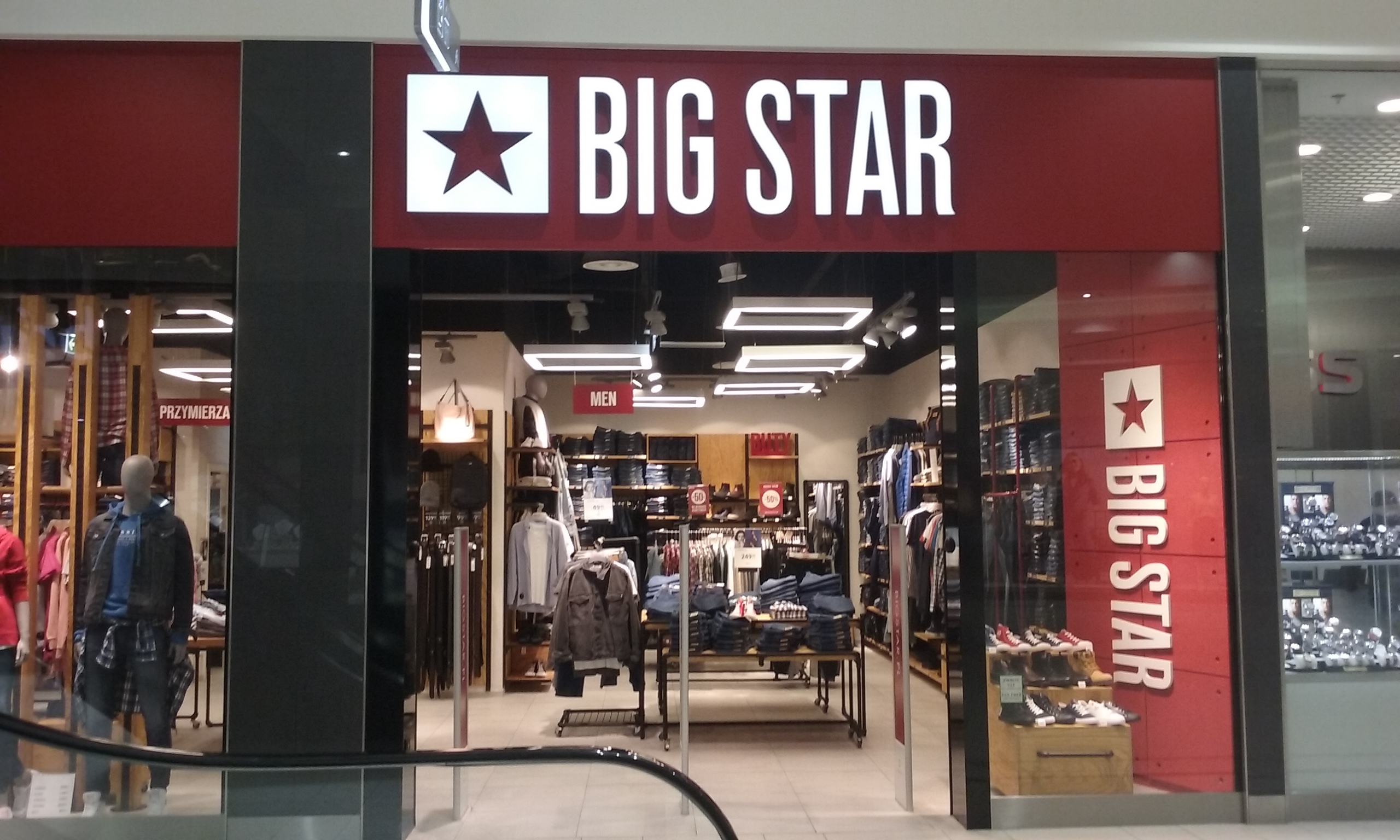 Salon odzieżowy polskiej marki Big Star w 60-tysięcznym Tomaszowie Mazowieckim